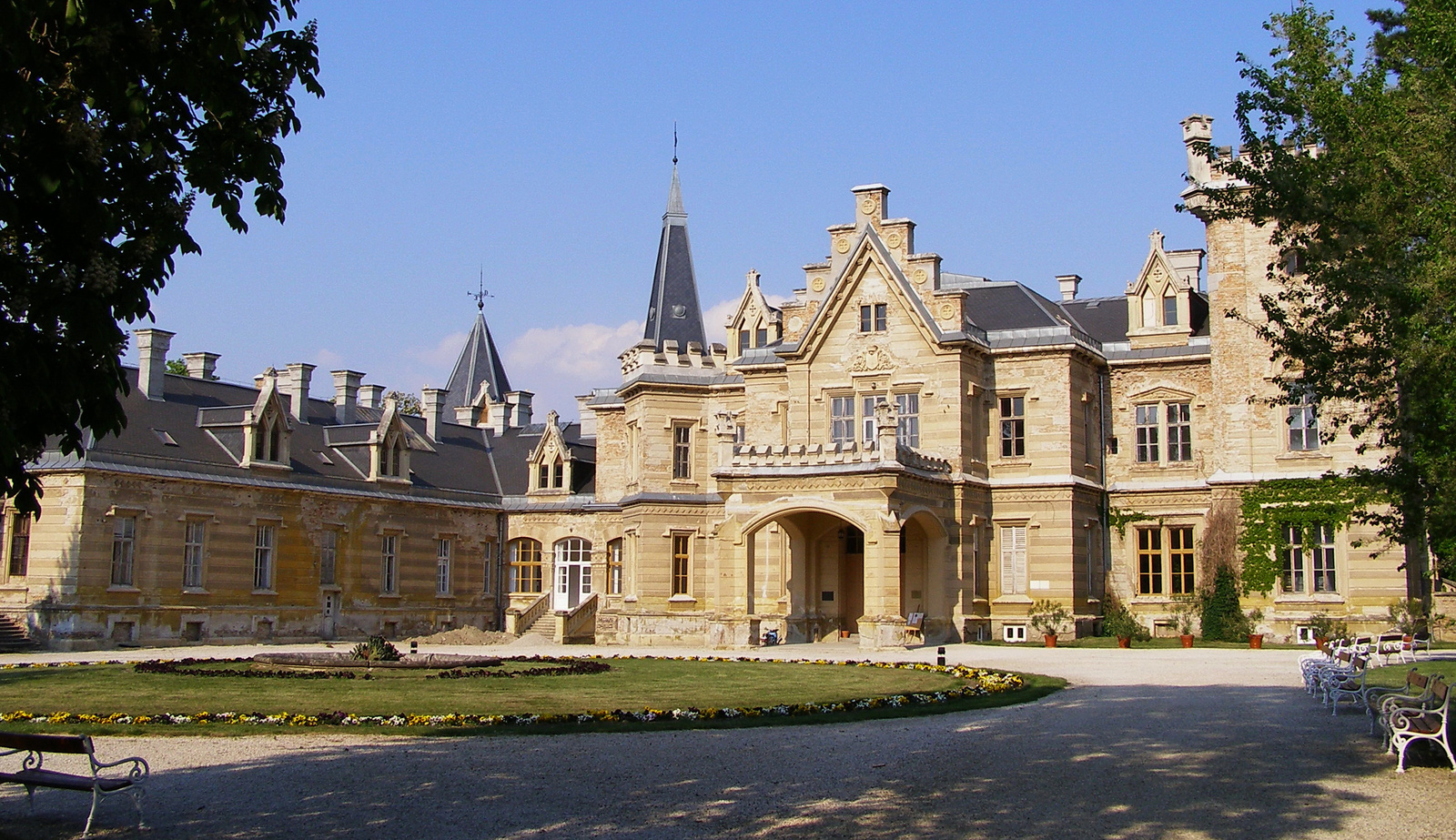 v. Nádasdy kastély (Nádasdladány, Kastély út) This is a photo of a monument in Hungary. Identifier: 3730